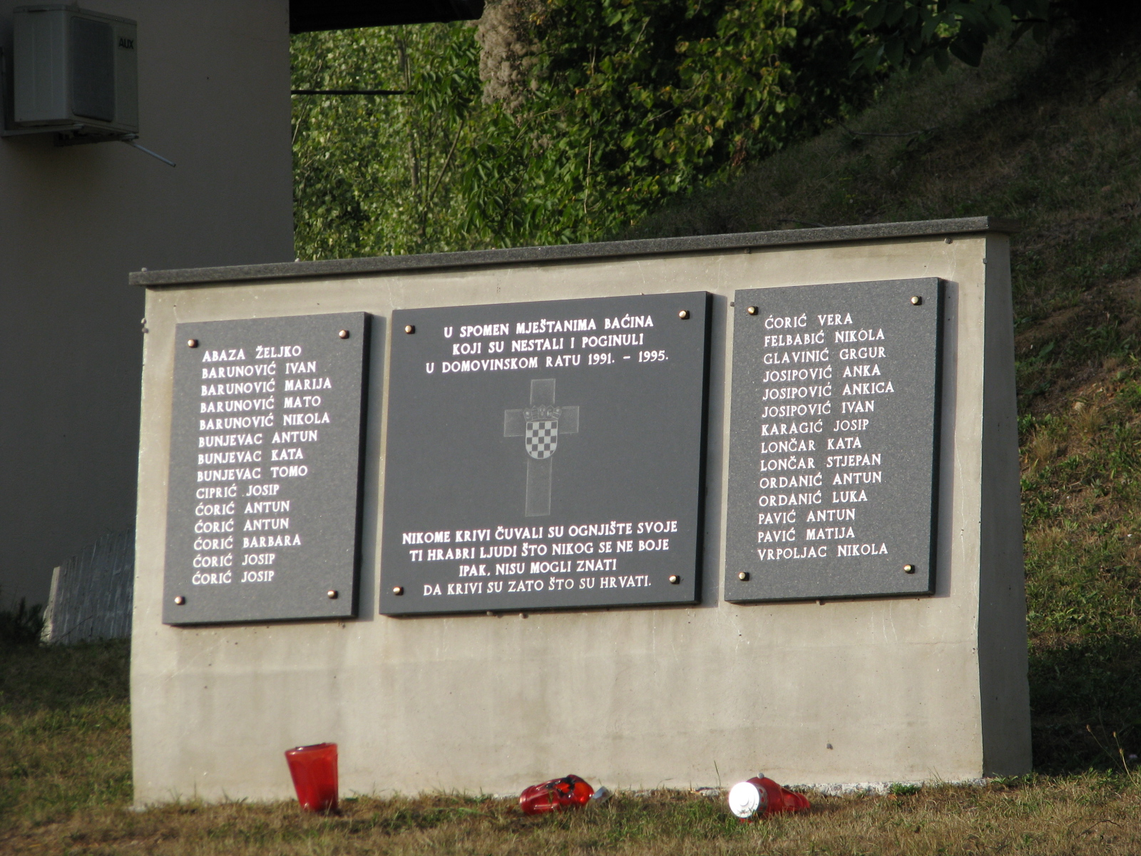 Spomen ploča poginulima i nestalima u Domovinskom ratu u selu Baćinu